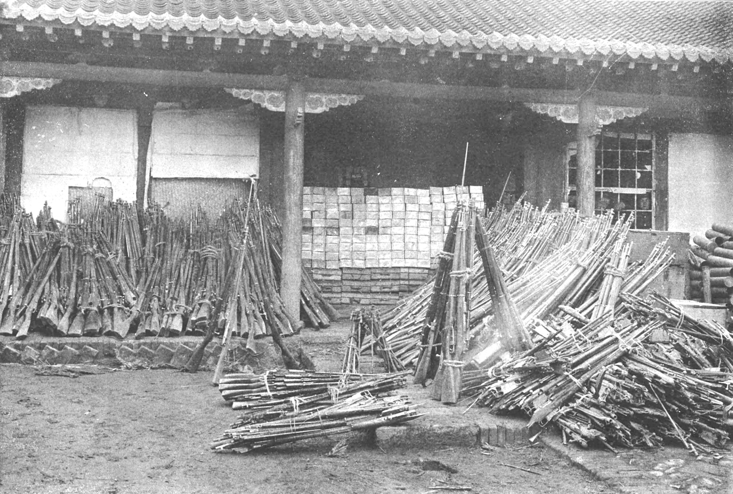 日露戦争中に撫順にて鹵獲されたモシン・ナガン